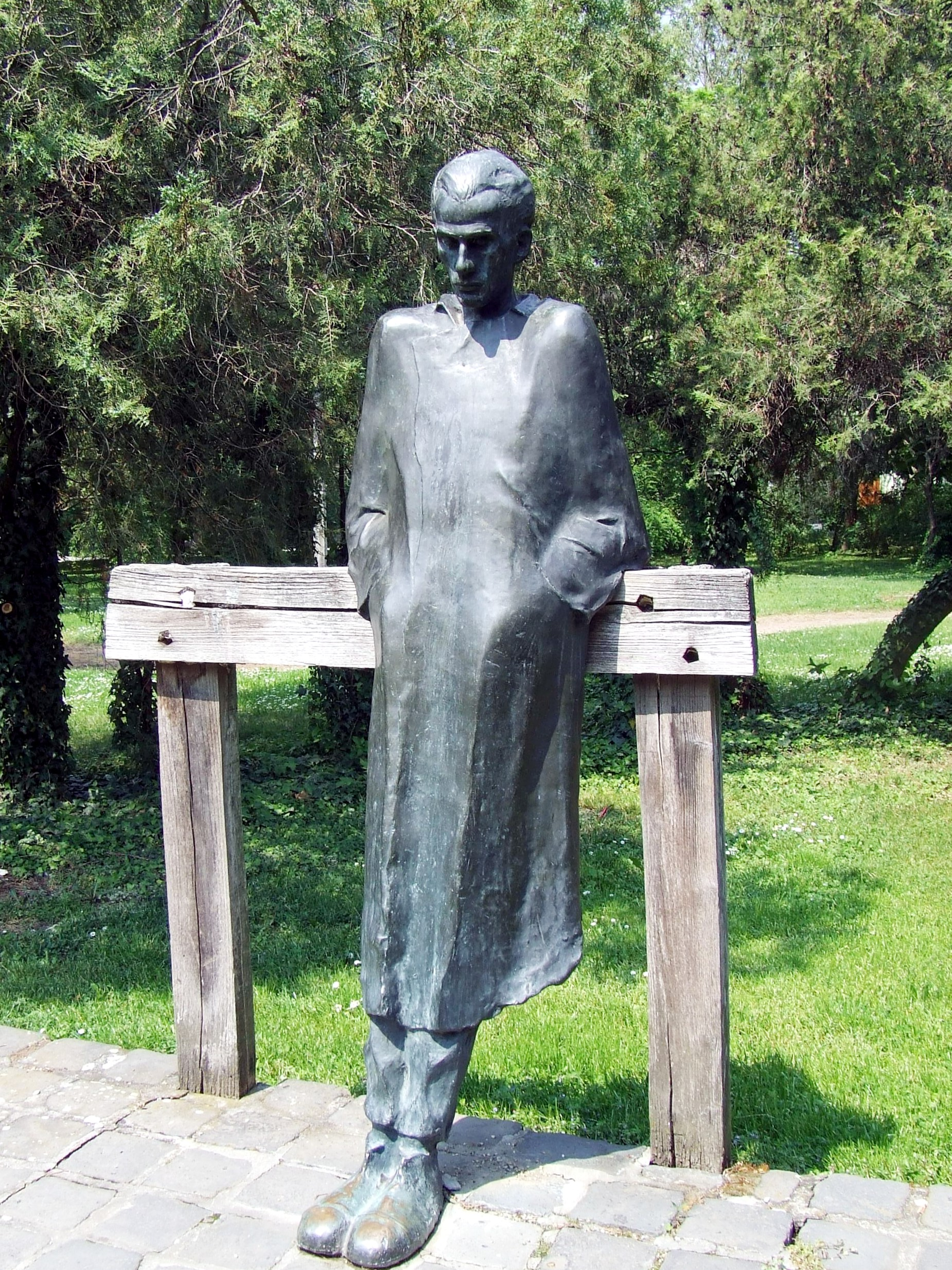 Radnóti Miklós szobra Mohácson (Hősök Parkja). Varga Imre alkotása (bronz, 1970)